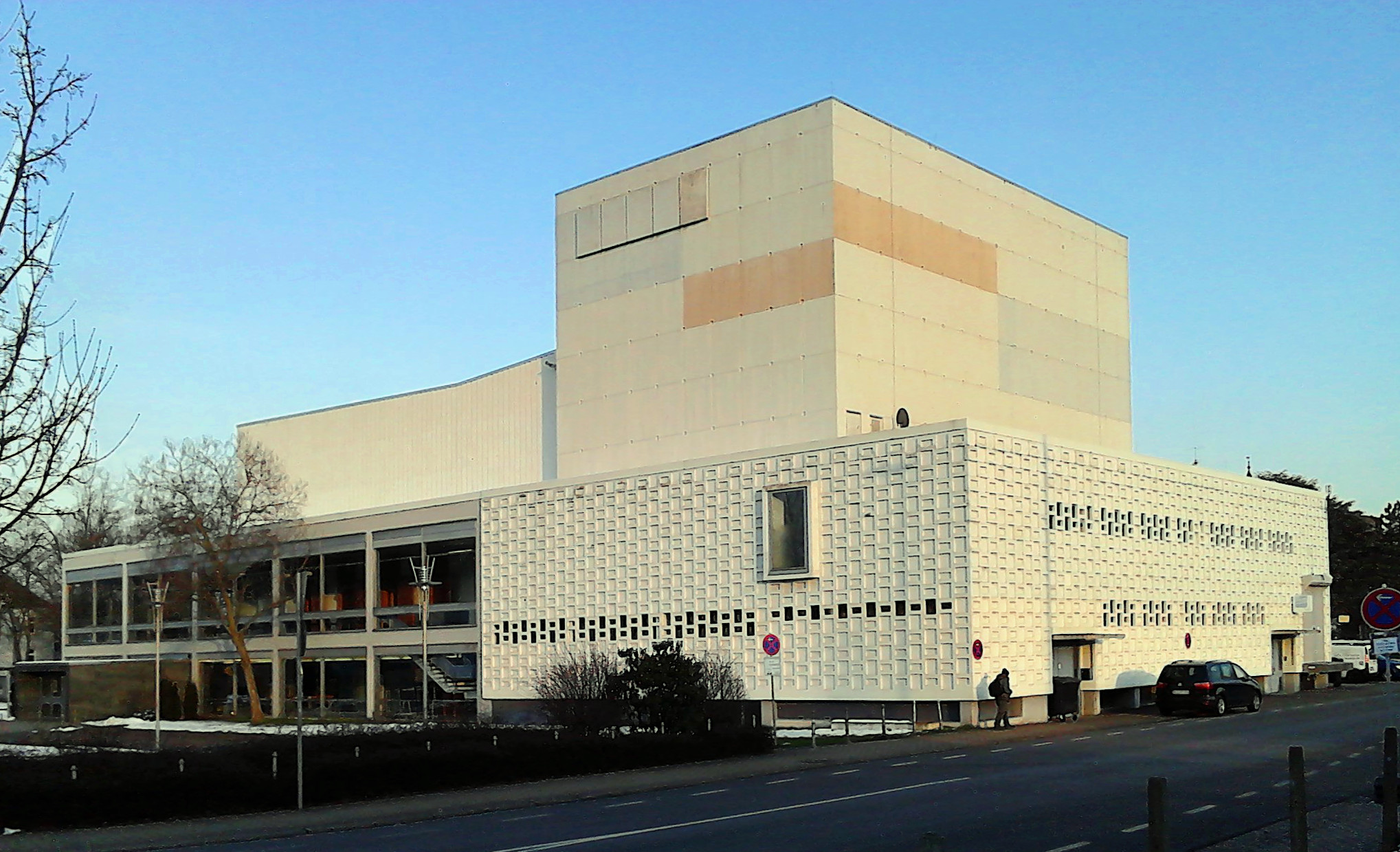 Stadthalle Dillingen (Einzeldenkmal)